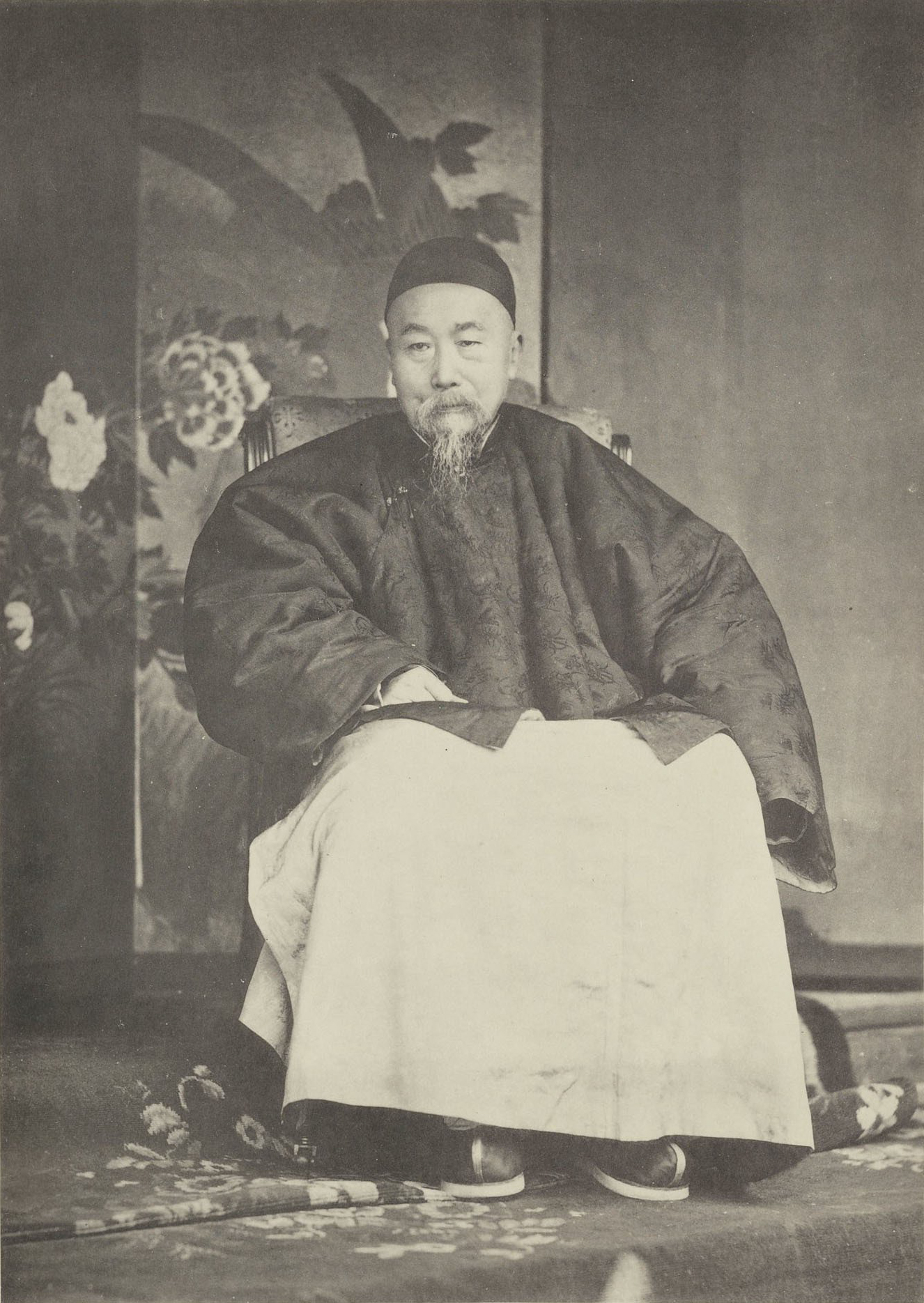 中文（中国大陆）: 清光緒二十一年、日本明治二十八年（1895年）于日本簽署《馬關條約》期間原照片題：清國欽差頭等全權大臣李鴻章負傷痊愈之眞像